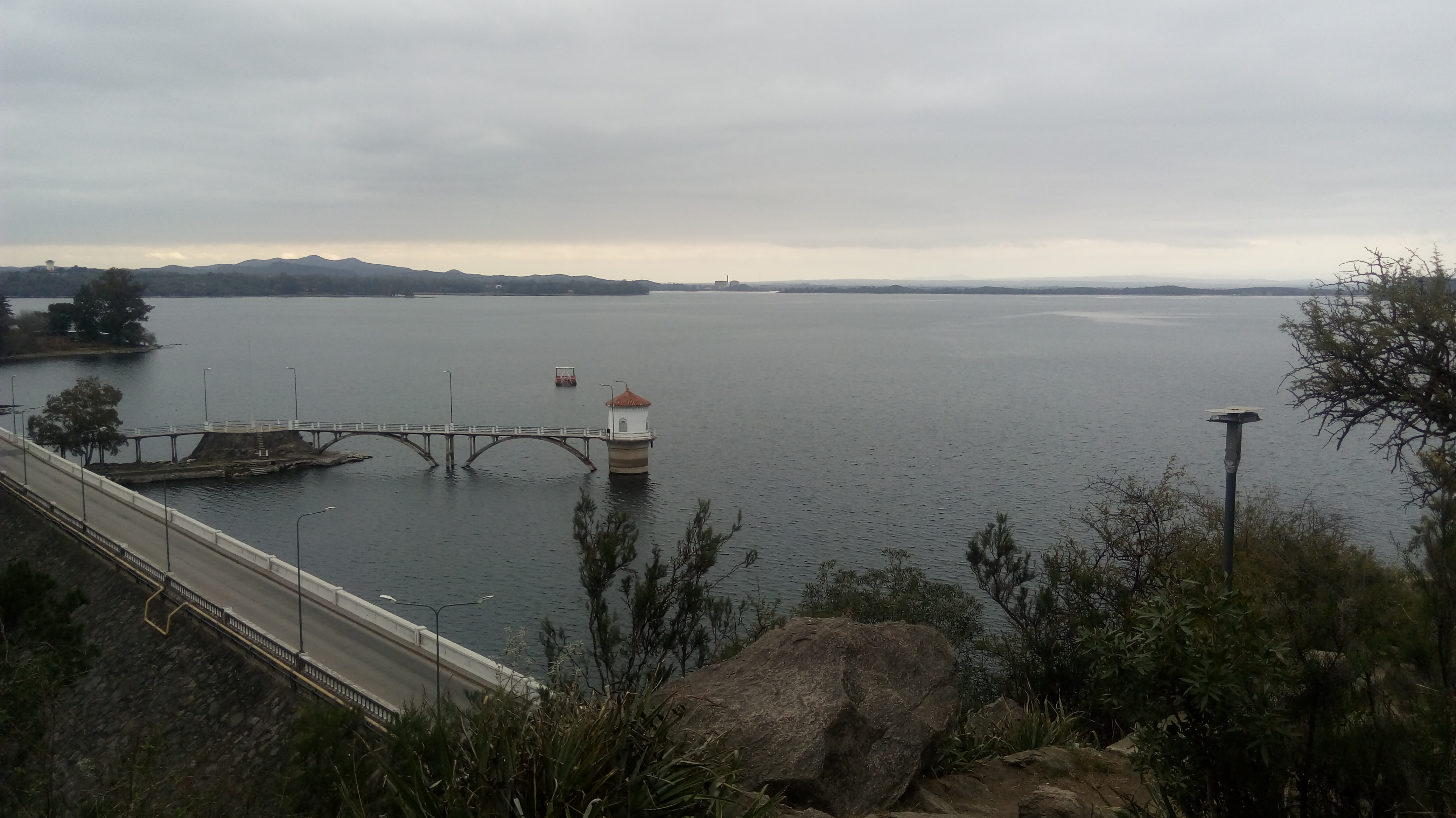 Vista panorámica parcial del embalse Ministro Pistarini